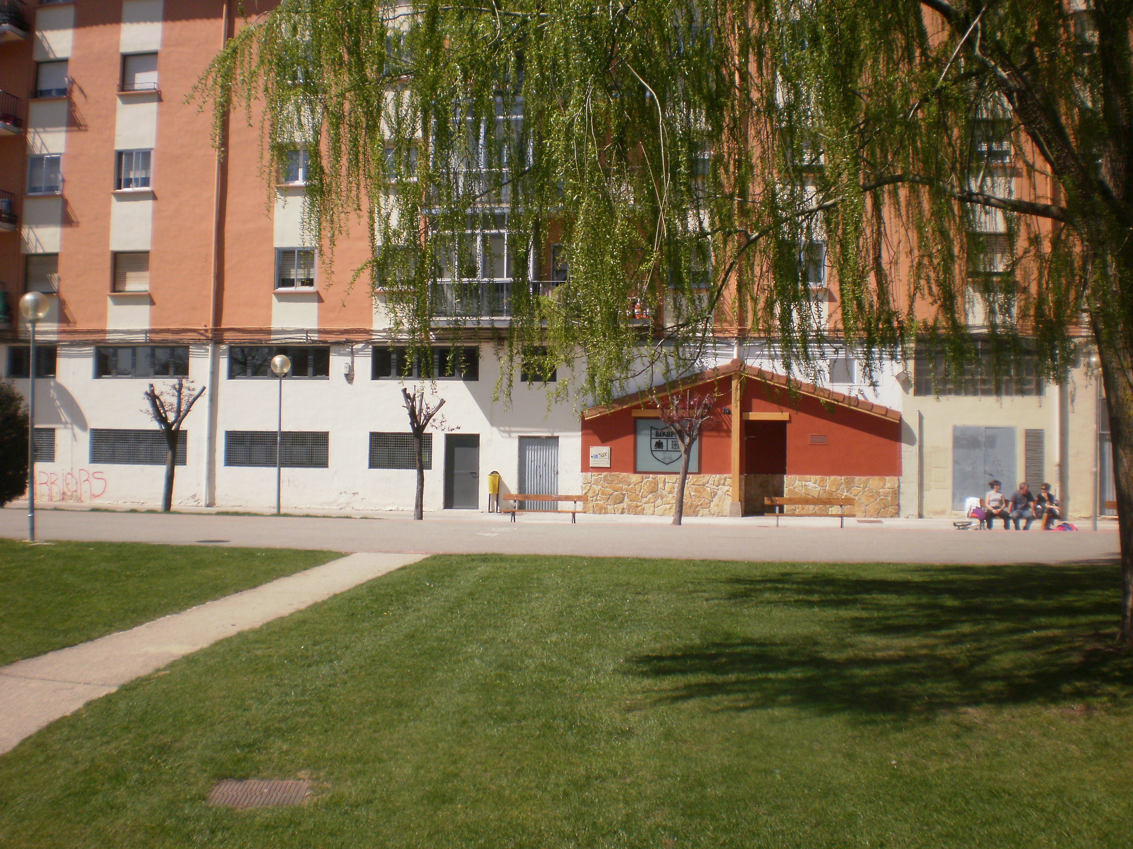 Sede de la asociación cultural Bikupe Elkartea de Ansoáin (Navarra-España)